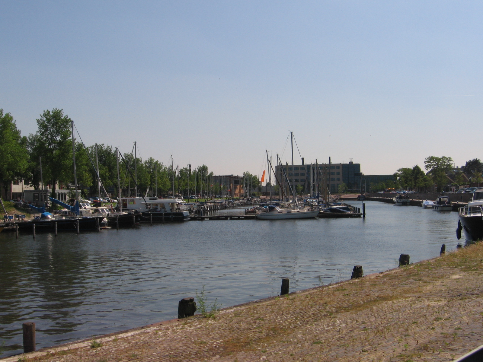 Huizen, haven, juni 2006